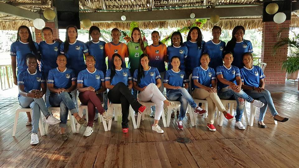 Orsomarso S.C. femenino 2017. De izquierda a derecha, superior: Jorelyn Carabali, Darnelly Quintero, María Camila Martínez, Fátima Montaño, Iris Maturin Lopez, Isabella Palacio, Lina Karina Salguero, Carmen Rodallega, Carmen Judith Gamboa,(pendiente identificación), Maria Nisa Marquinez. Inferior: Cris Moreno, Lida Velasco Bermudez, Laura Cosme,(pendiente identificación),Melissa Cepeda, Lina Paola Vásquez Castrillón,(pendiente identificación), Rosy Lorena Caicedo, (pendiente identificación).